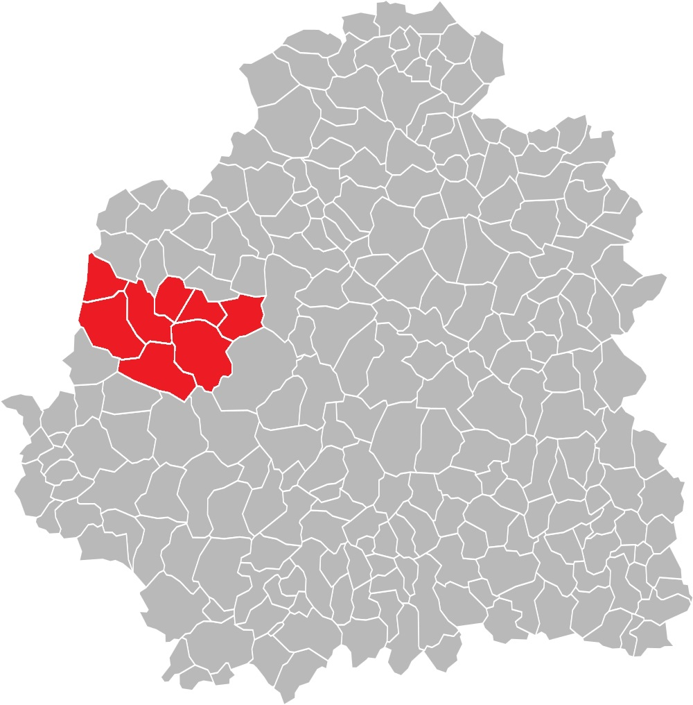 Carte des communes de l'Indre (36) : Le canton de Mézières-en-Brenne, de 1790 à 2015.